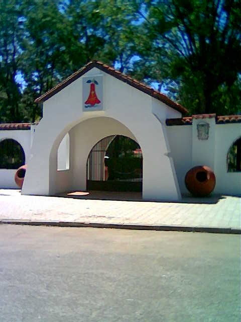 Main entrance. Termas de Panimávida, Linares, Chile.